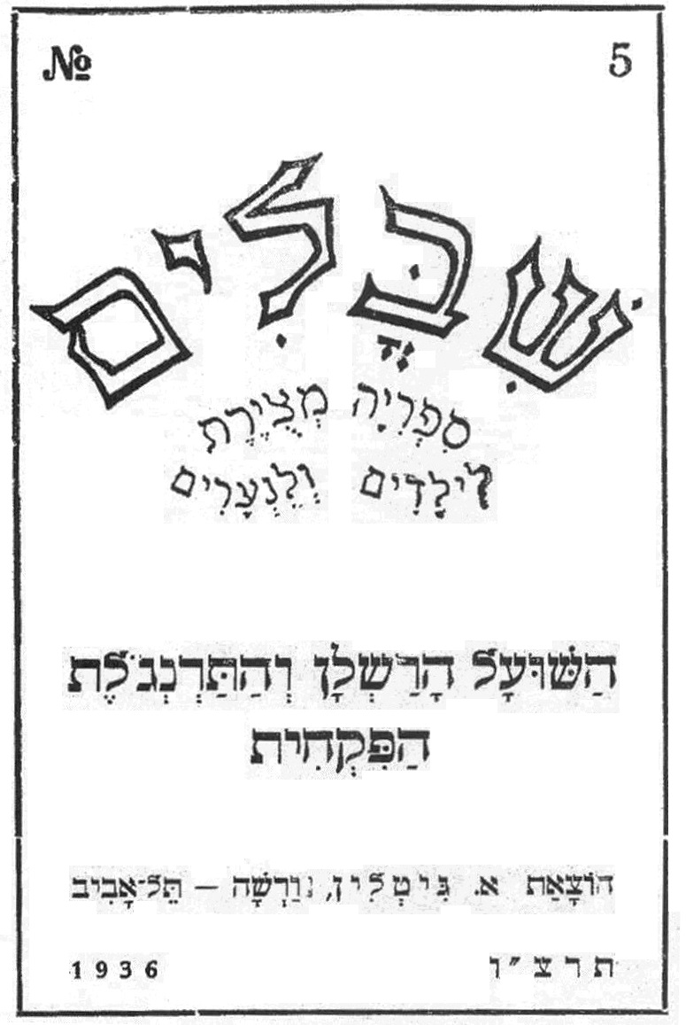 שבלים חוברת מס.5; א.גיטלין, ורשה-תל אביב, תרצ"ו 1936